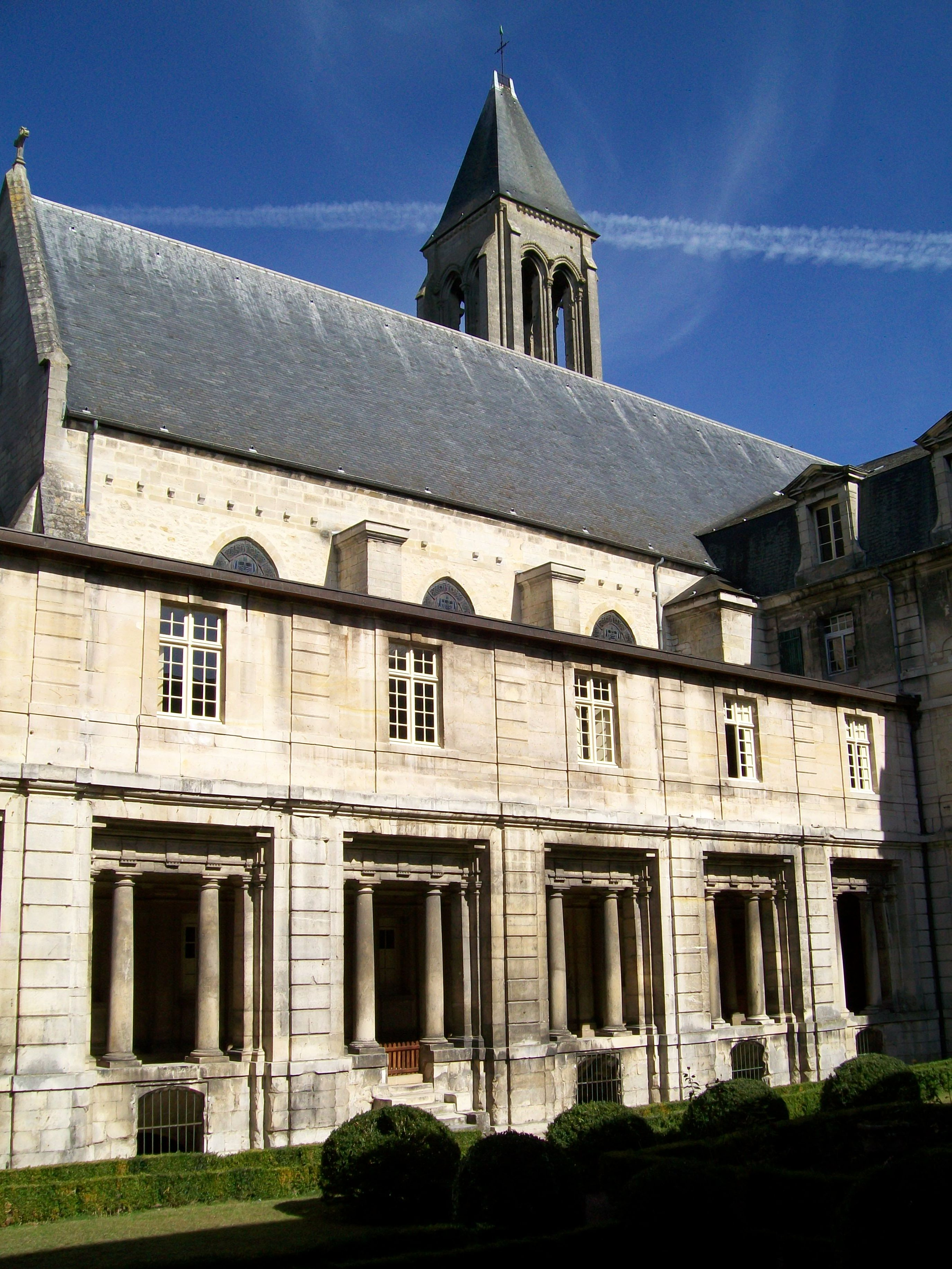 Ancienne abbaye Saint-Vincent, vue sur l'église depuis le clôitre.